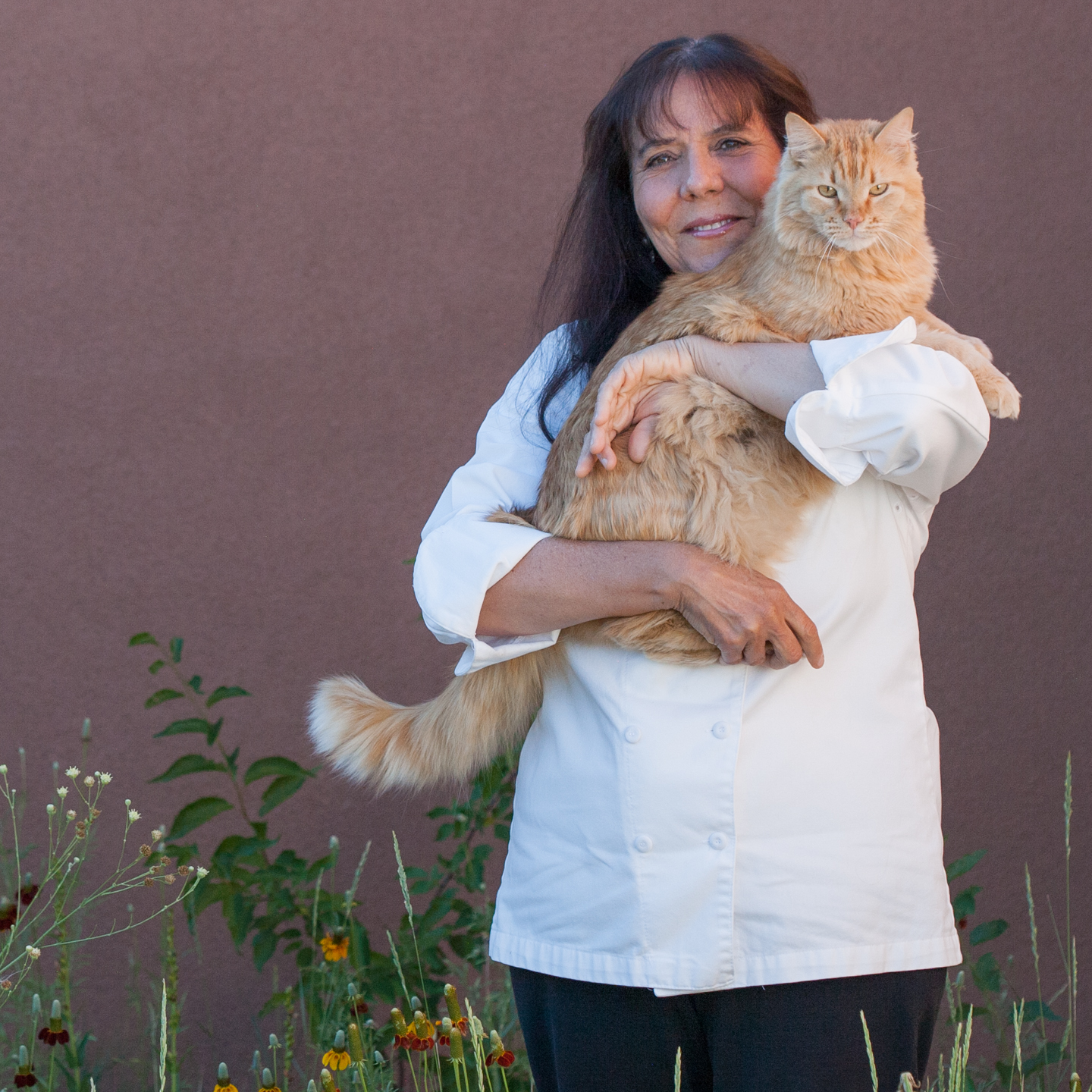 Chef Lois Ellen Frank